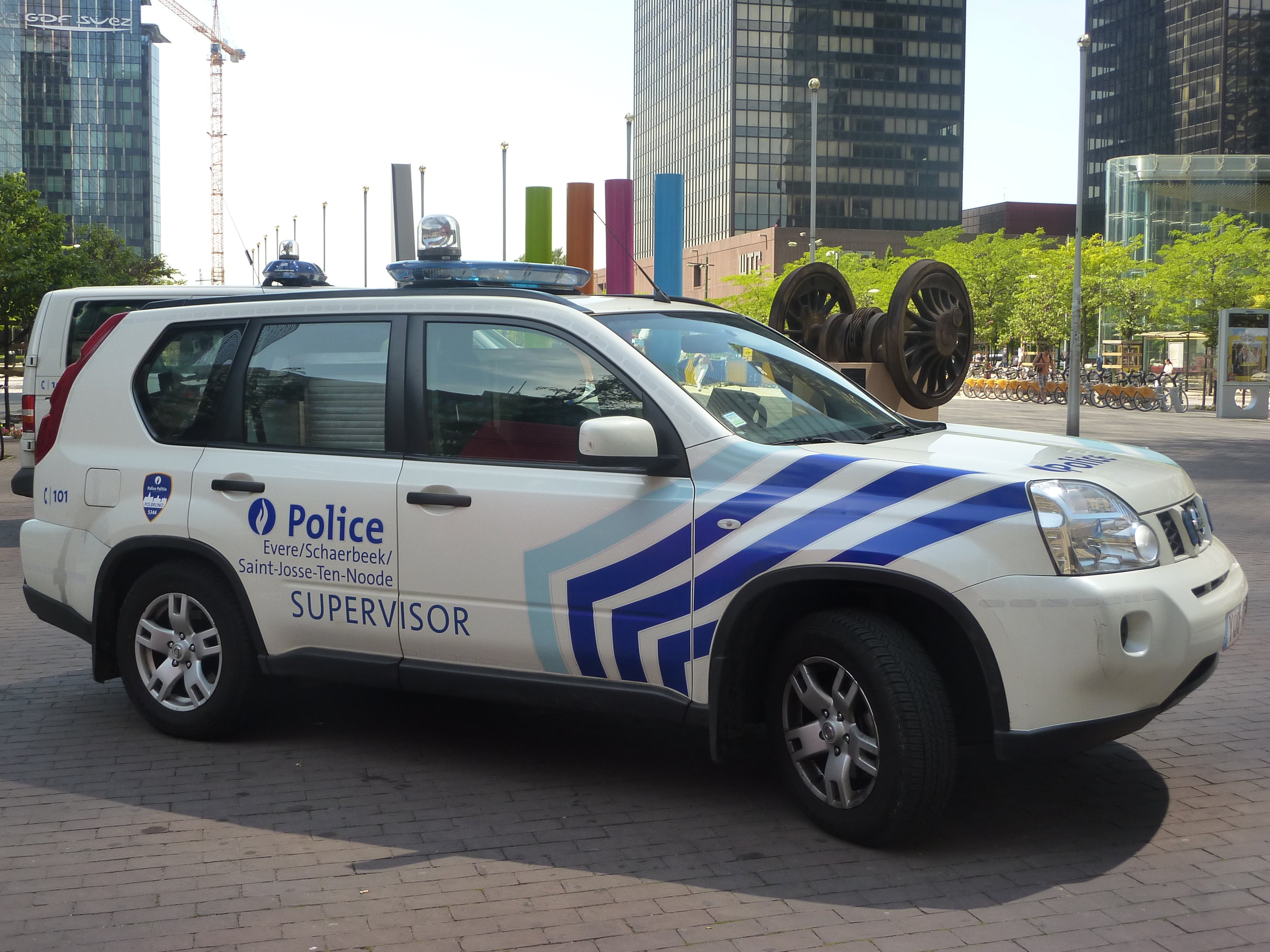 Voiture de la zone de police bruxelloise 5344 Polbruno.